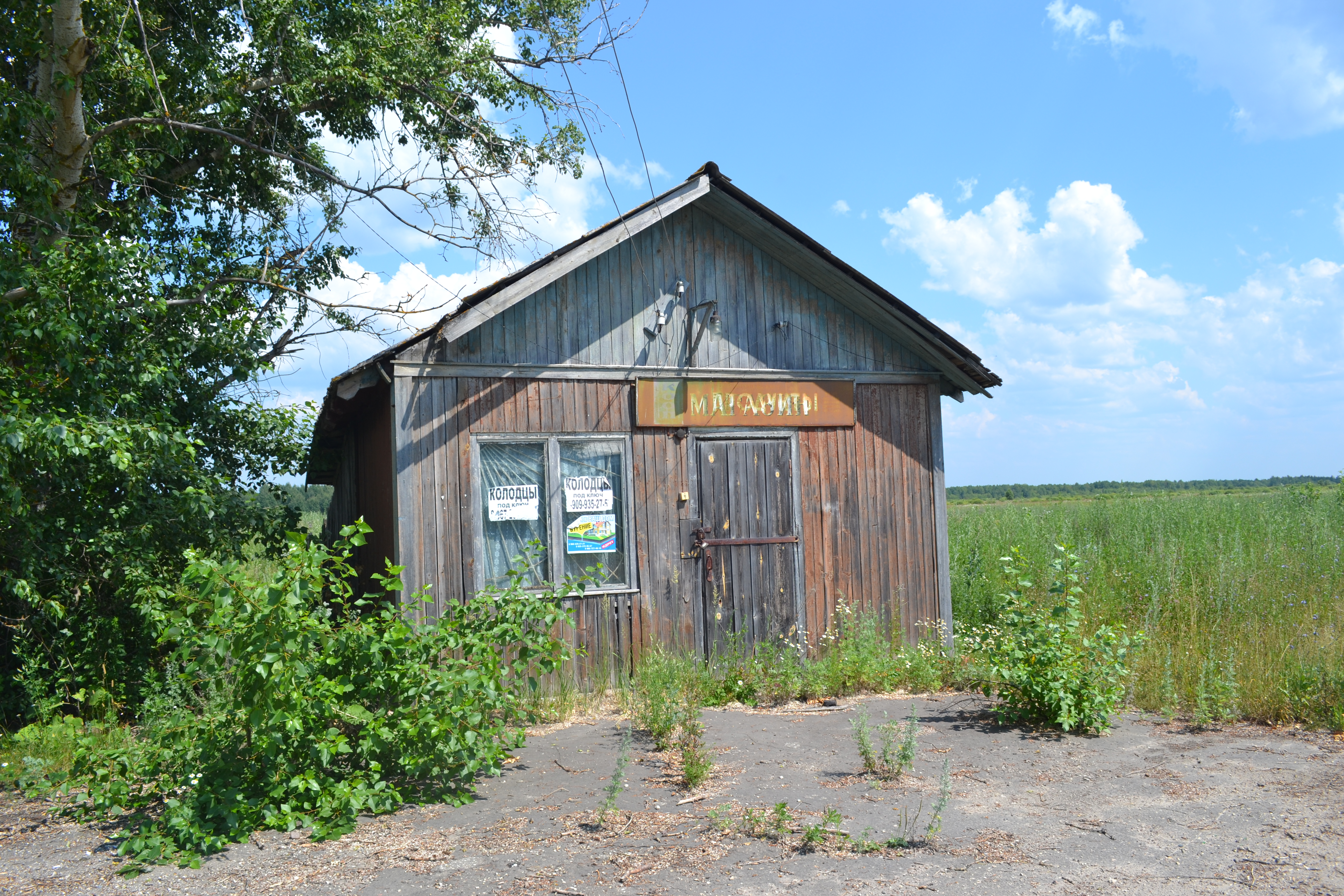 Магазин в деревне Зименки (Шатурский район)